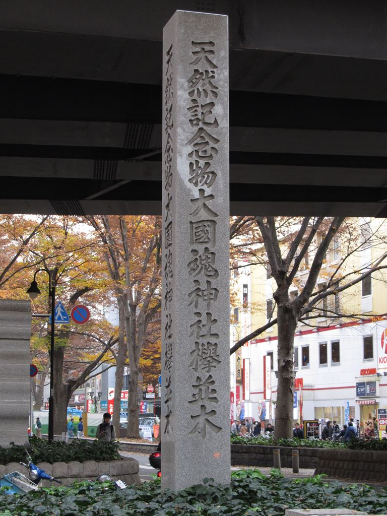 東京都府中市 Fuchu-city, Tokyo